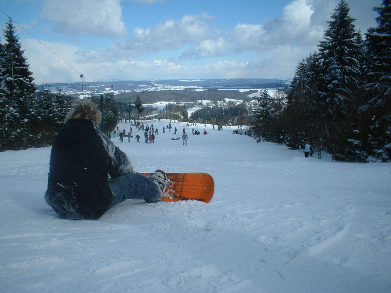 Skipiste Baraque de Fraiture (België).